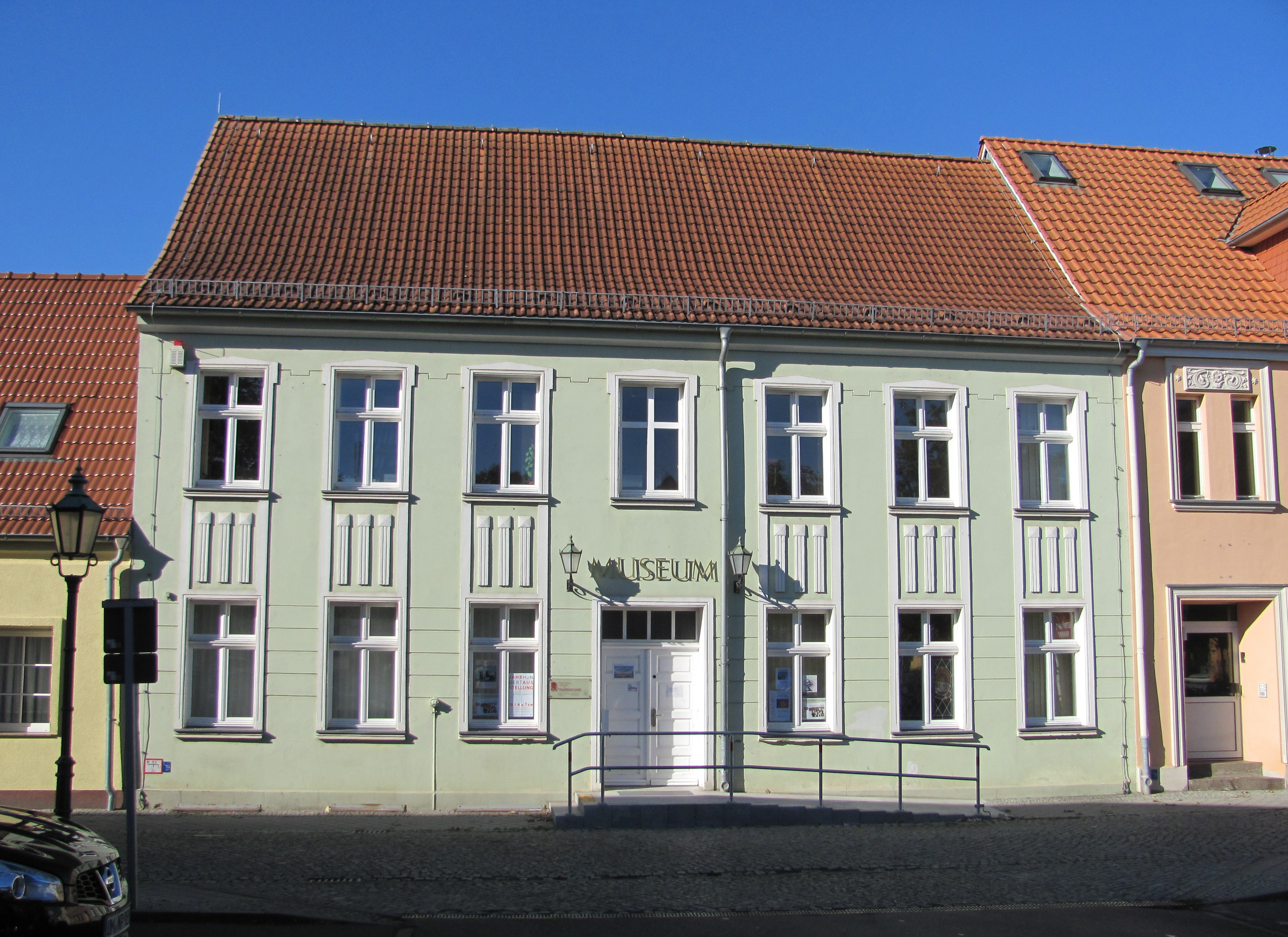 Jugendstilgebäude, Wohnhaus heute wird es als Stadtmuseum genutzt Schwedt, Denkmalliste Nr. 25